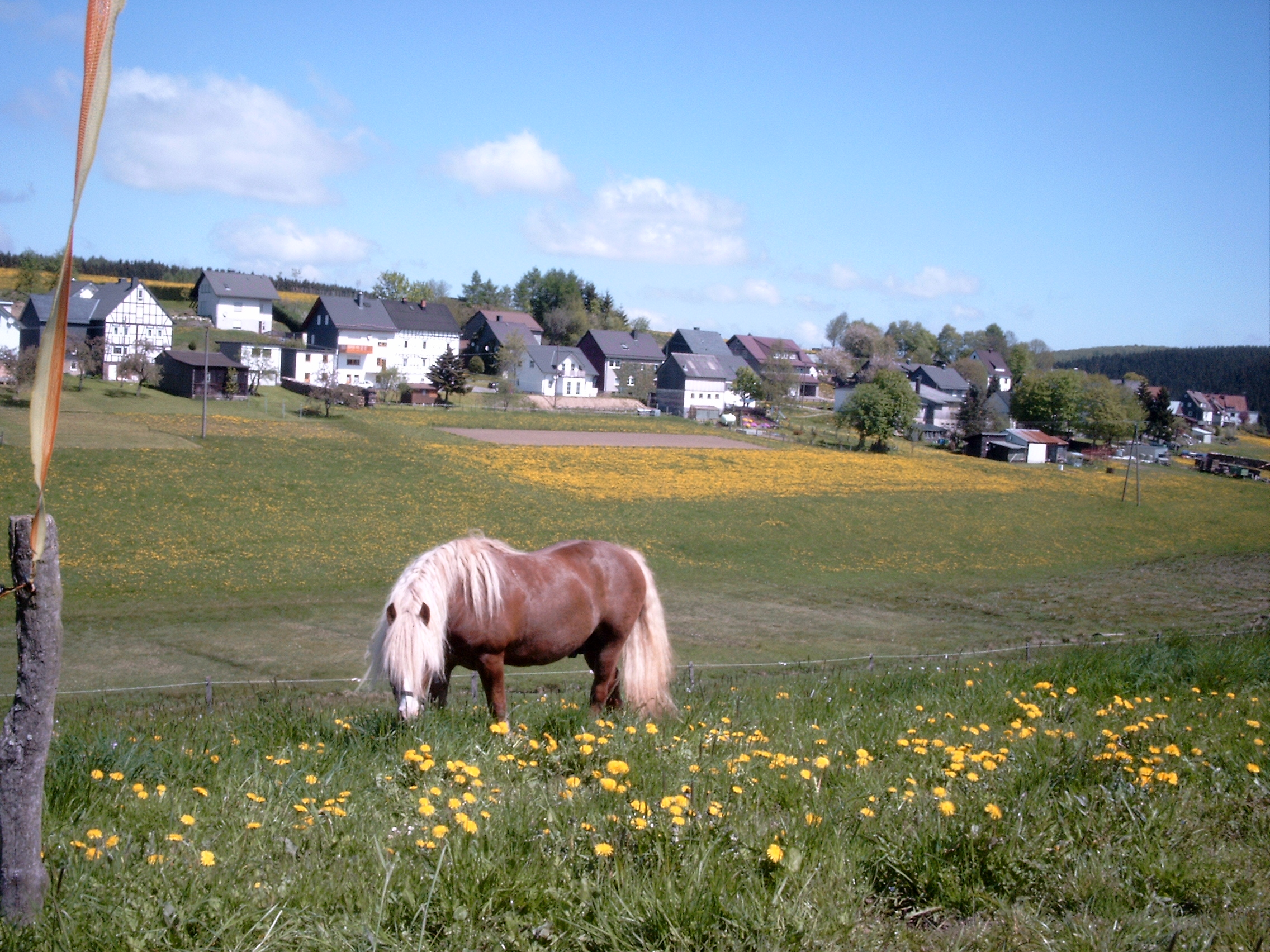 Tallage von Benfe, aus Richtung Benfer Rücken